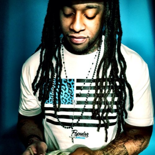 Rapero